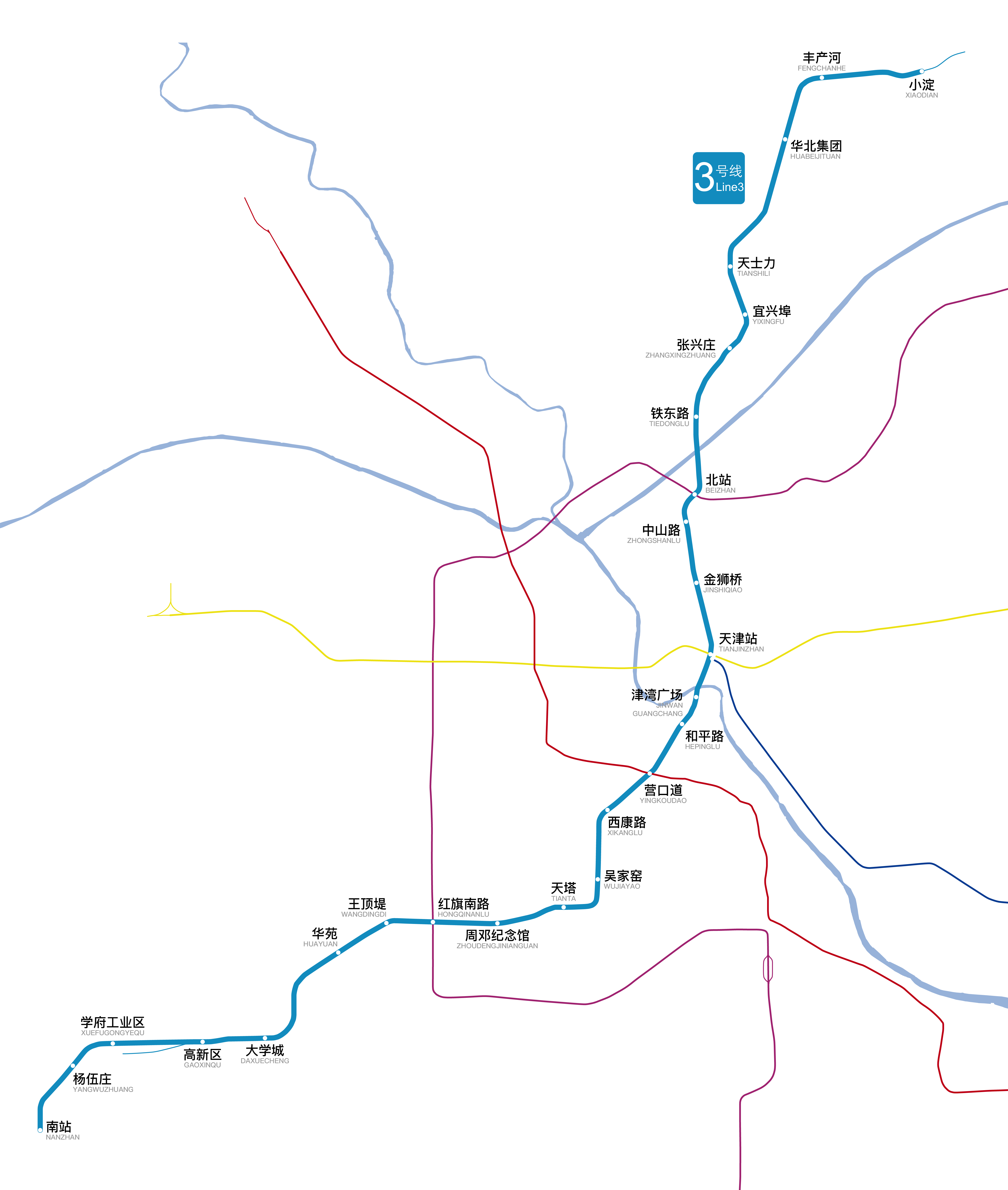 中文（中国大陆）: 天津地铁3号线线路图，更新于2018年6月